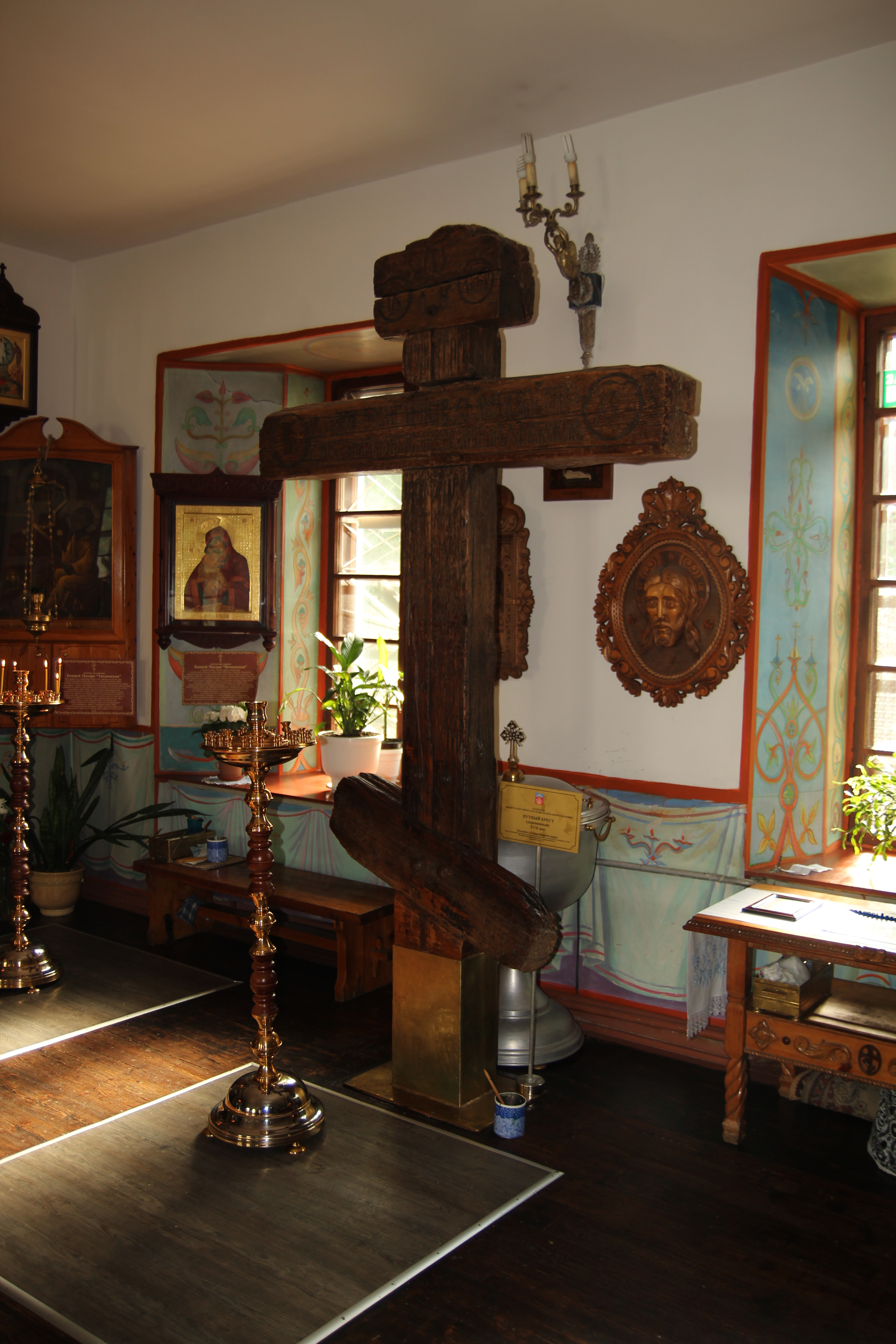 Путный деревянный крест XVII века